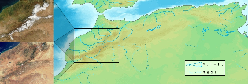 Das Bild zeigt zwei Fotos eines identischen Ausschnitts einiger Gebirgszüge in Marokko im Januar und im April. Die Karte zeigt die größten Flüsse, Wadis und Schotts des Atlasgebirges. Die jährliche Schneeschmelze in den schneebedeckten Hochgebirgen hat wesentlichen Anteil an der Entstehung der Wasserläufe und -Reservoirs.